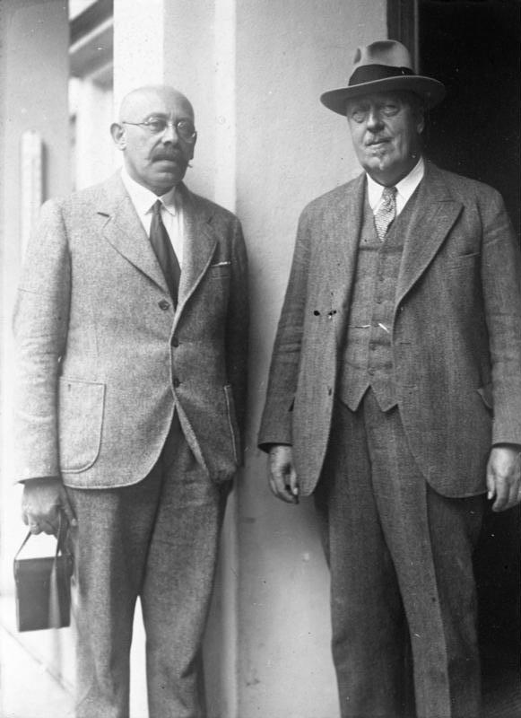 Zum bevorstehenden Polarflug des "Graf Zeppelin"! Die Leiter der Arktisfahrt des "Graf Zeppelin" Prof. Samoilowitsch und Dr. Eckener in Friedrichshafen am Bodensee.